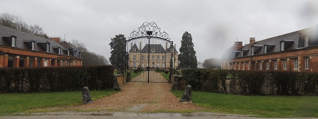 Château de Villemesle, derrière la grille d'honneur avec de part et d'autres les batiments des communs